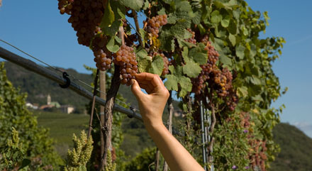 Weinberg mit Gewürztraminer in Tramin